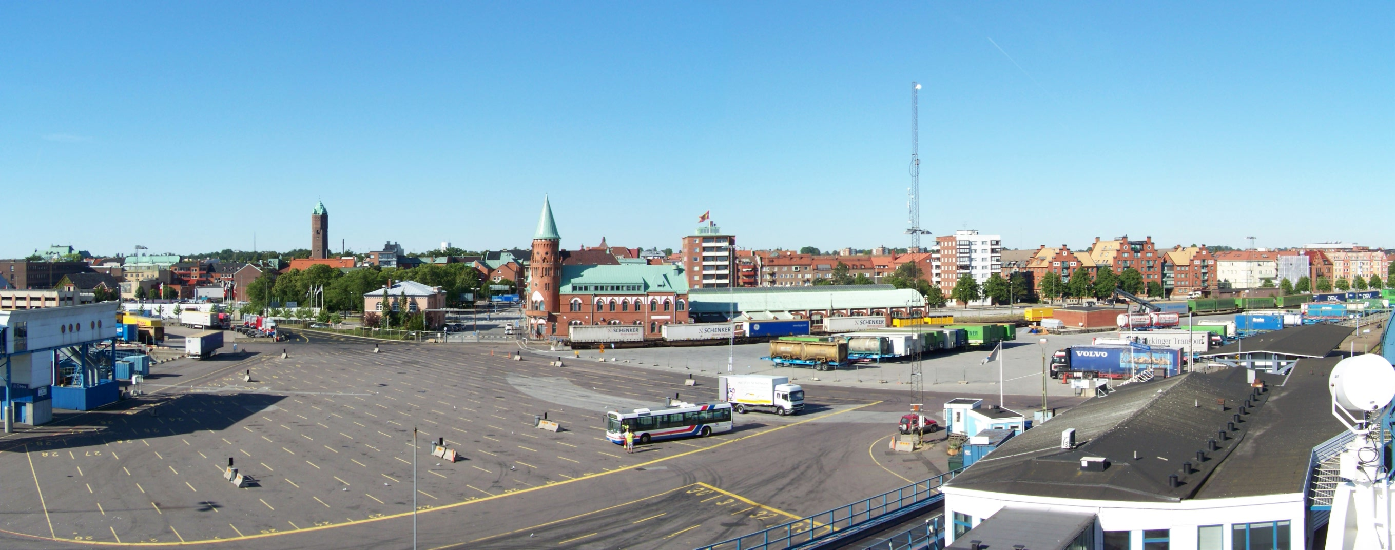 Trelleborg, Panorama